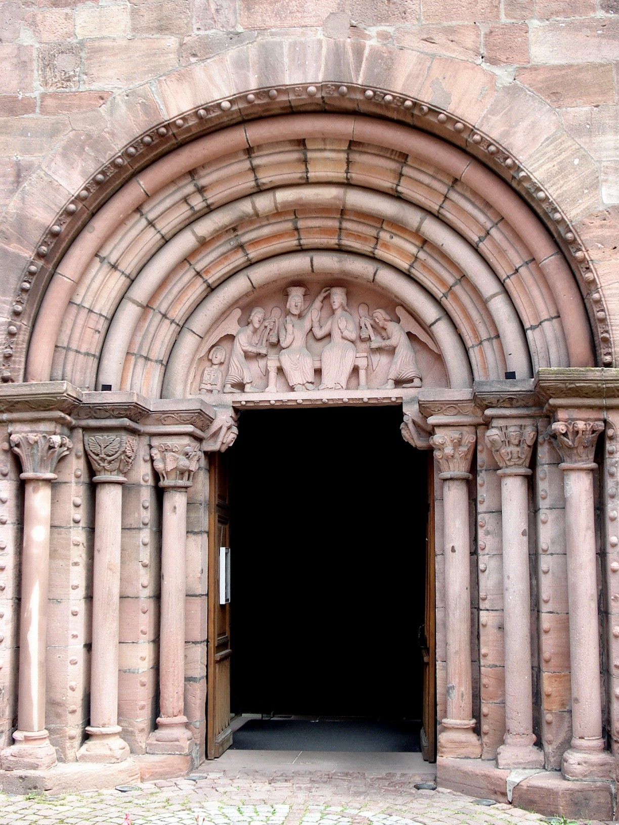 Kaysersberg, Haut-Rhin, Alsace, France. Église Sainte-Croix: portail roman du XIIIe siècle.